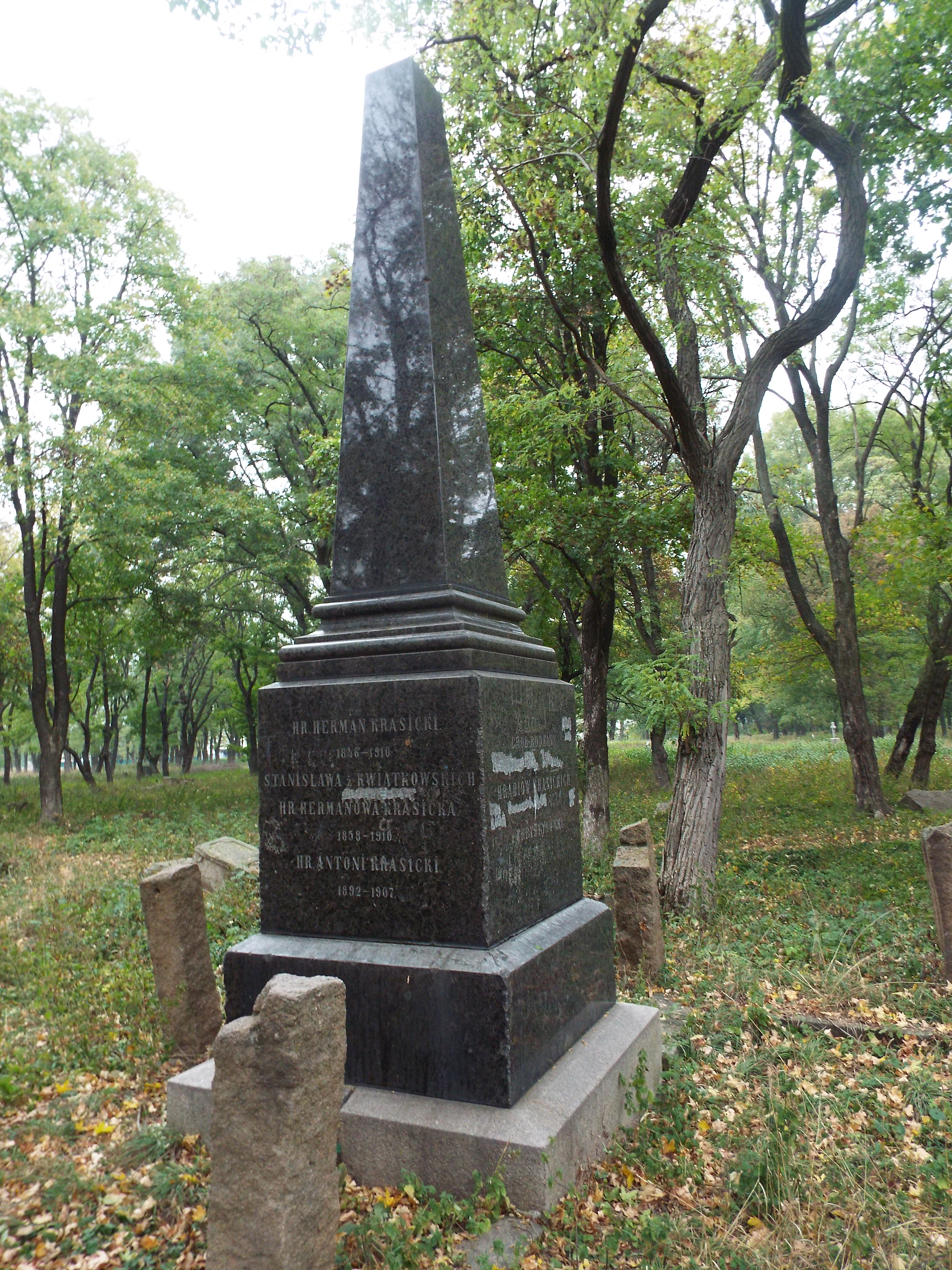 Умань. Католицька частина Міщанського кладовища, гробовець Красицьких, фото І. Парнікози, 2017 р.